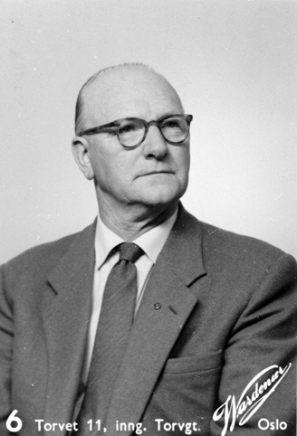 Emil Løvlien